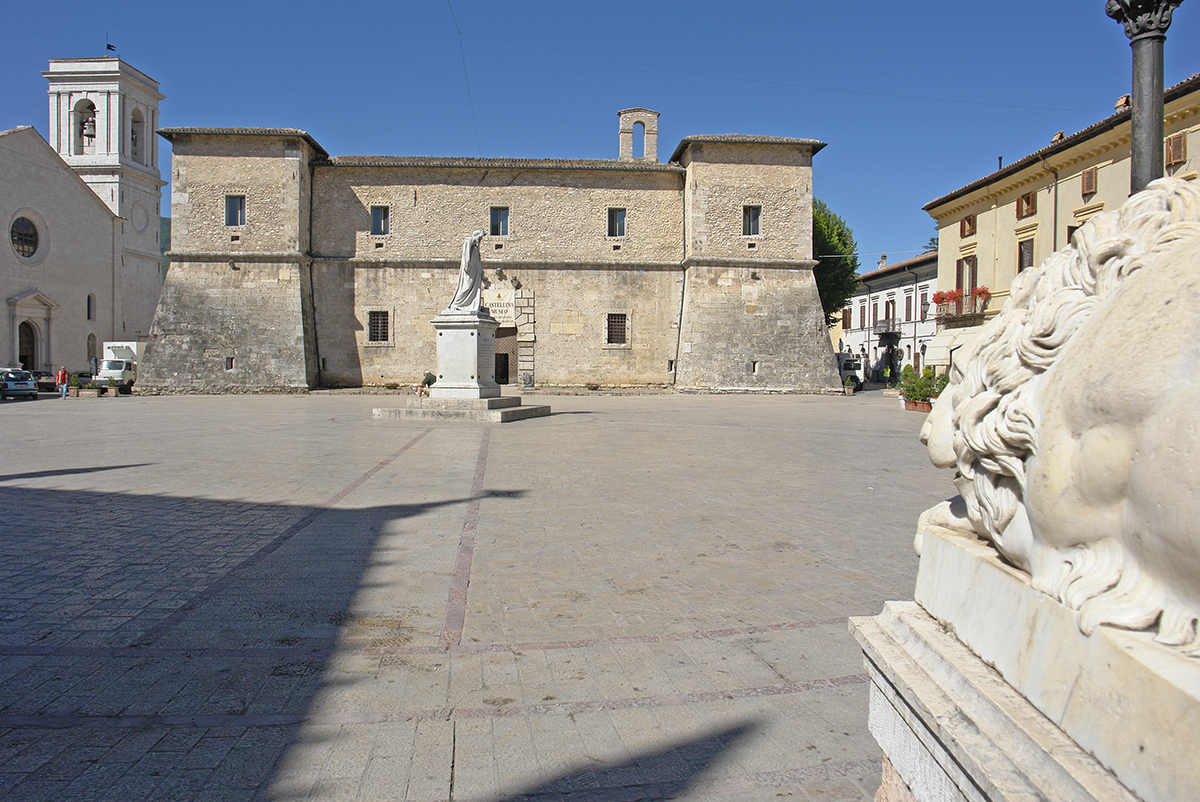 Norcia, Festung am der Piazza San Benedetto